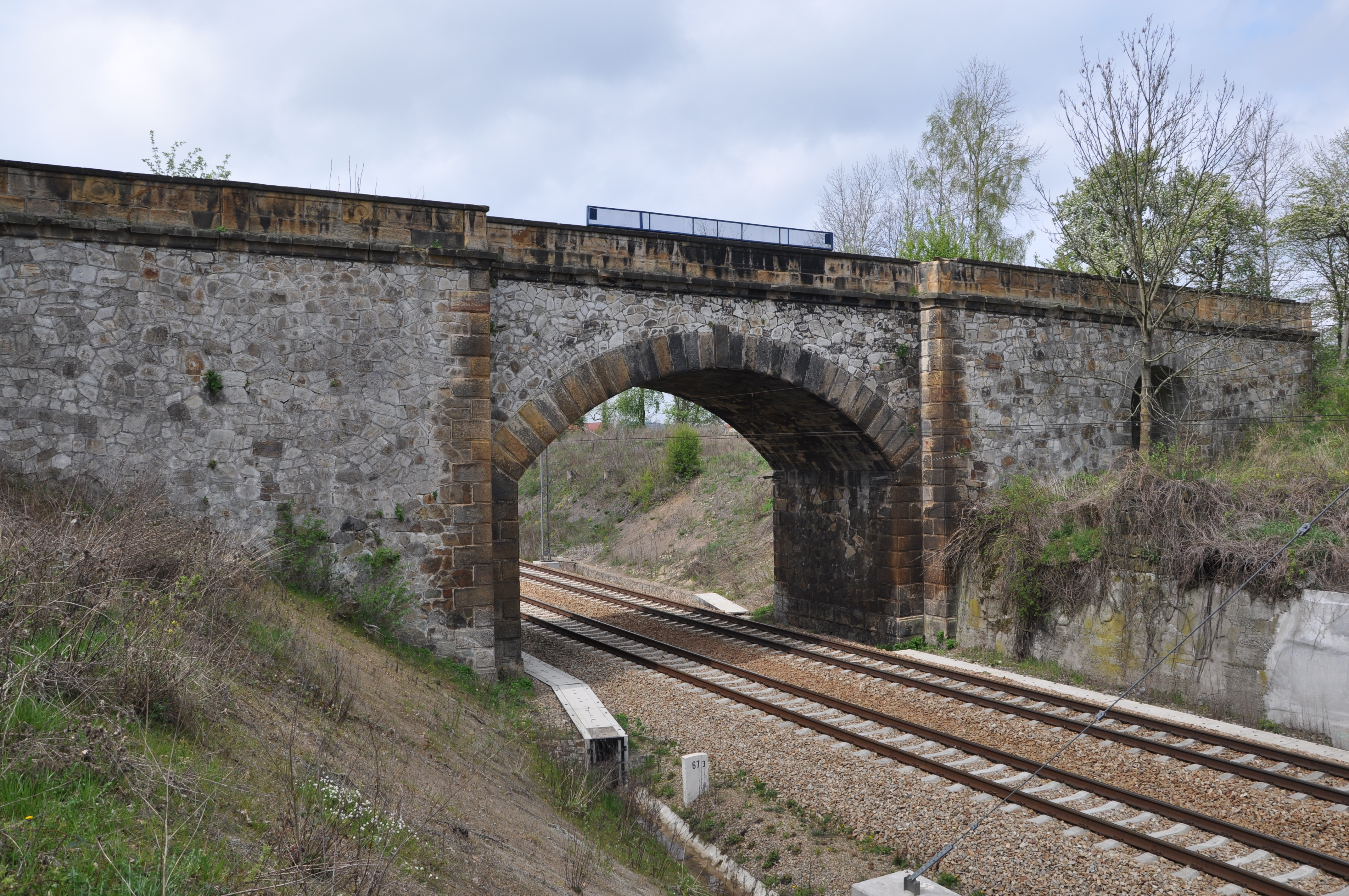 Brücke der unvollendeten Strousberg-Bahn über die Bahnstrecke Praha-Plzen Object location49° 50′ 02.1″ N, 13° 47′ 50.1″ E